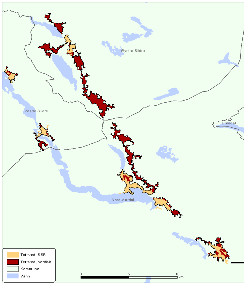 Tettstedutstrekning i sentrale Valdres Tettsted.